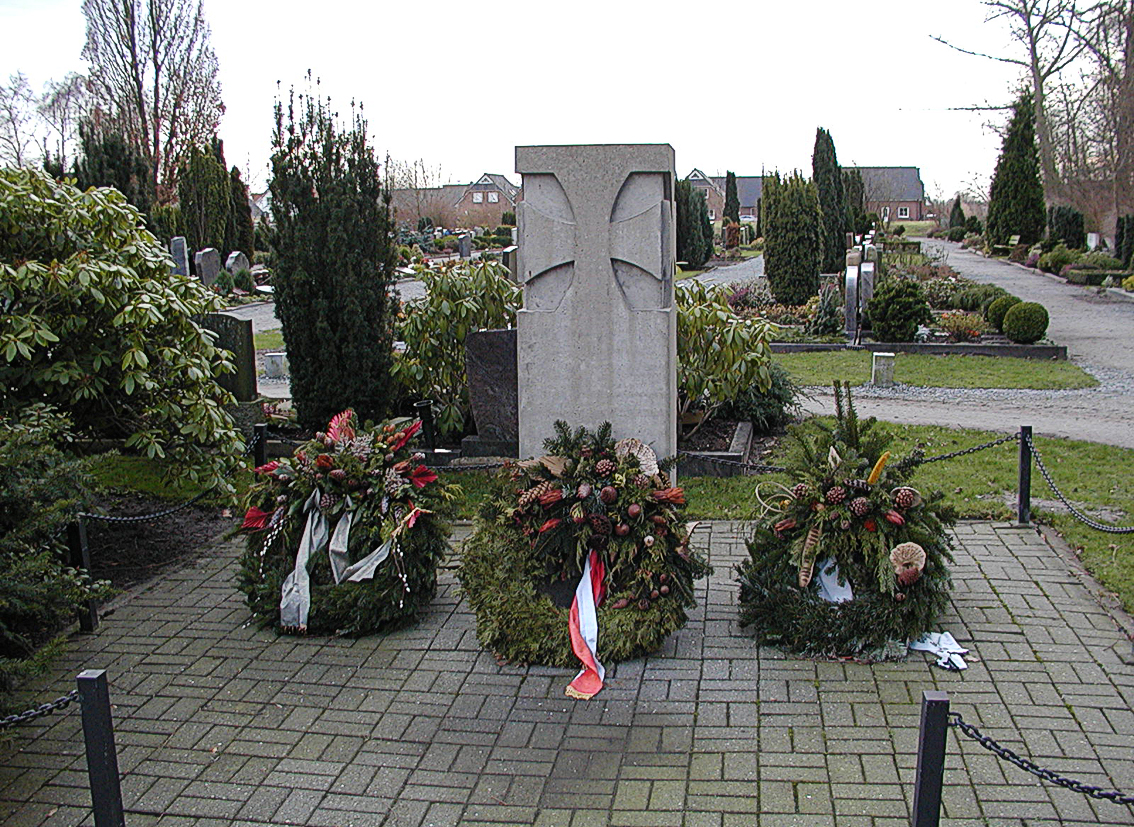 Kirche St. Abundus